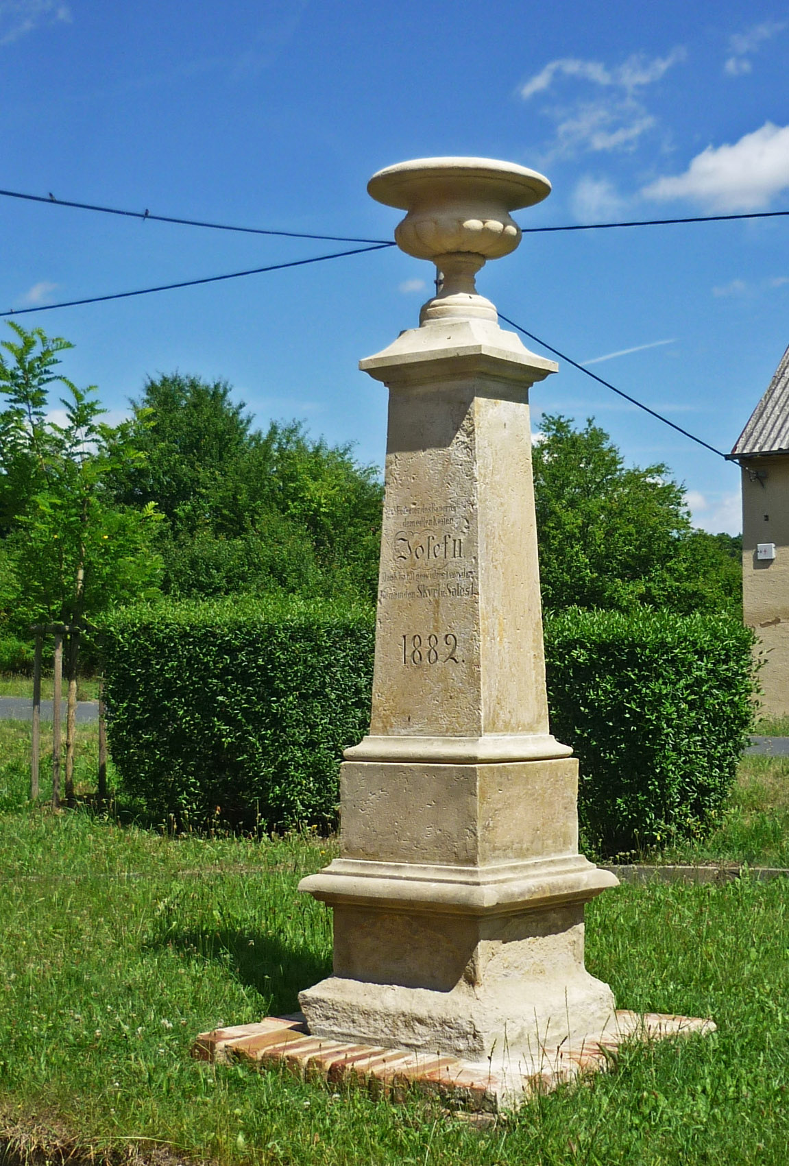 Gedenksäule für Kaiser Josef II. am Schloss Skyrl / Škrle